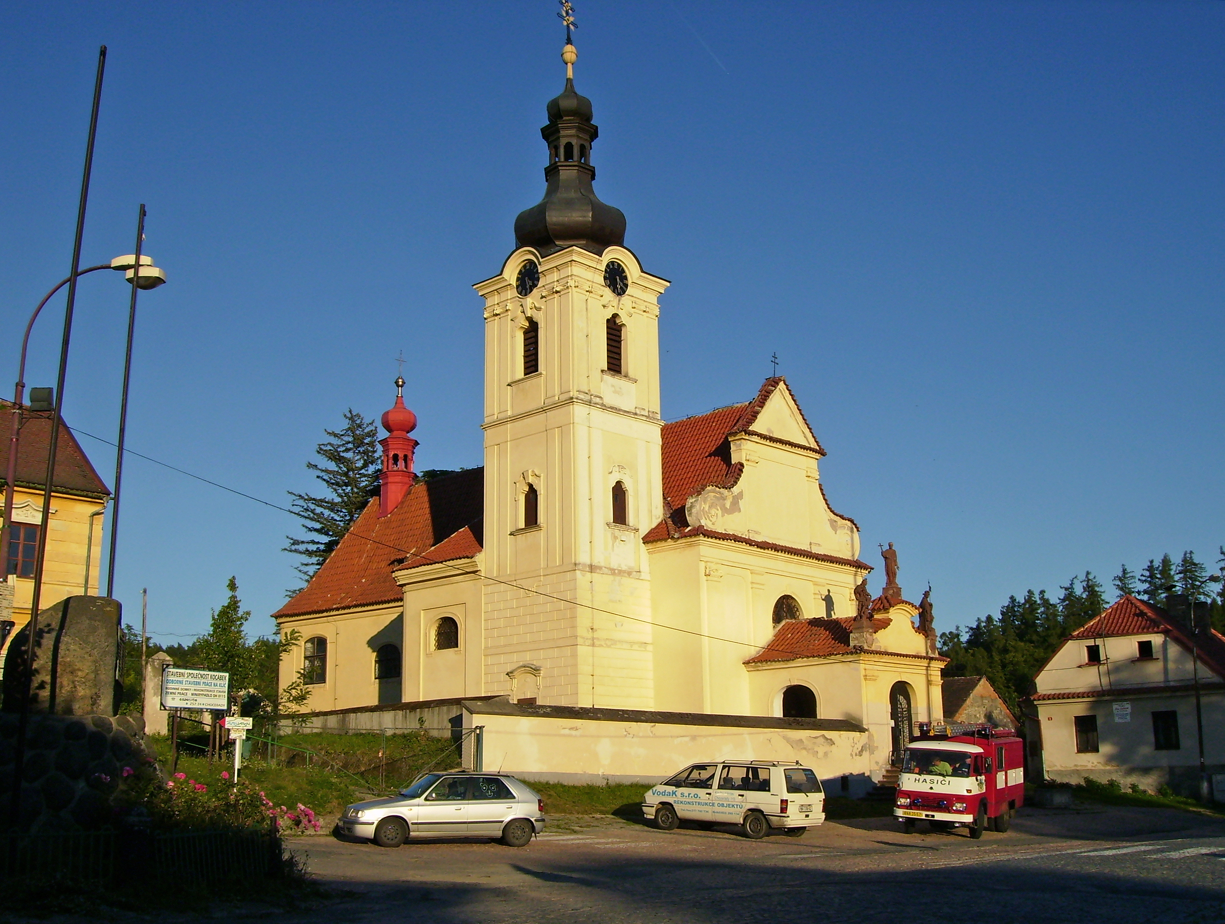 Kostel Nanebevzetí Panny Marie v Choceradech na Benešovsku.